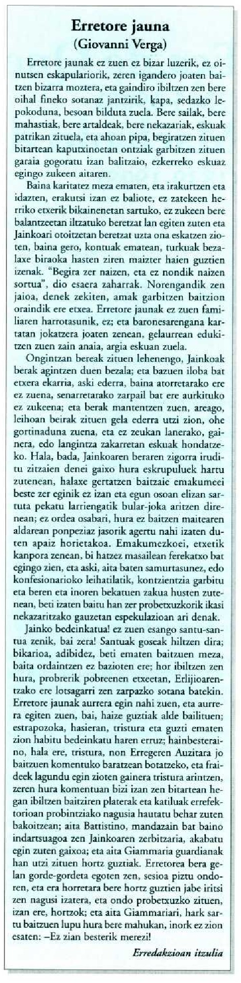 Giovanni Vergaren Erretore jauna, Lur Entziklopedia Tematikoa-k euskaratutako pasartea